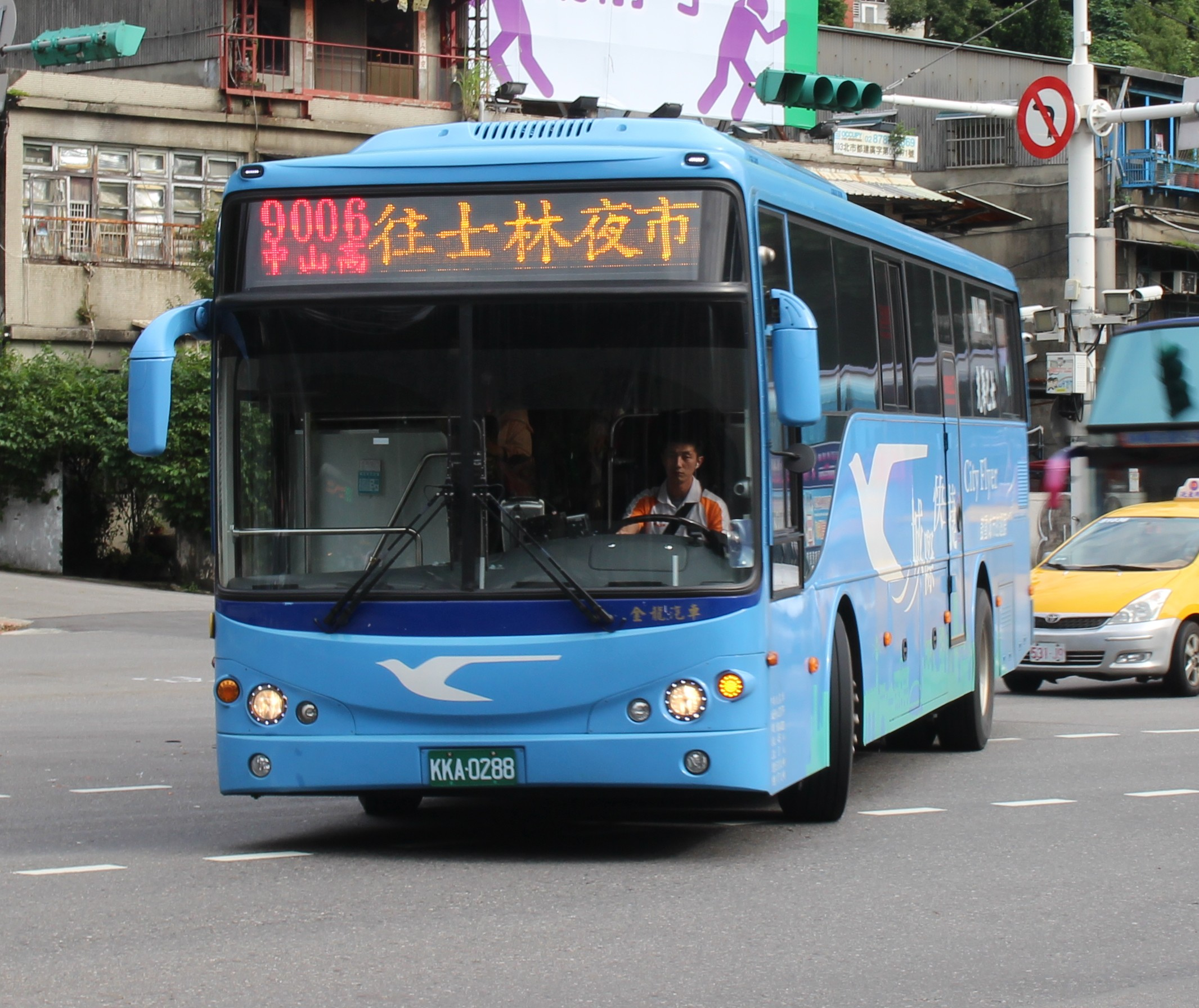 光華巴士2017年金龍KL6120U3大客車KKA-0288，行駛9006線。